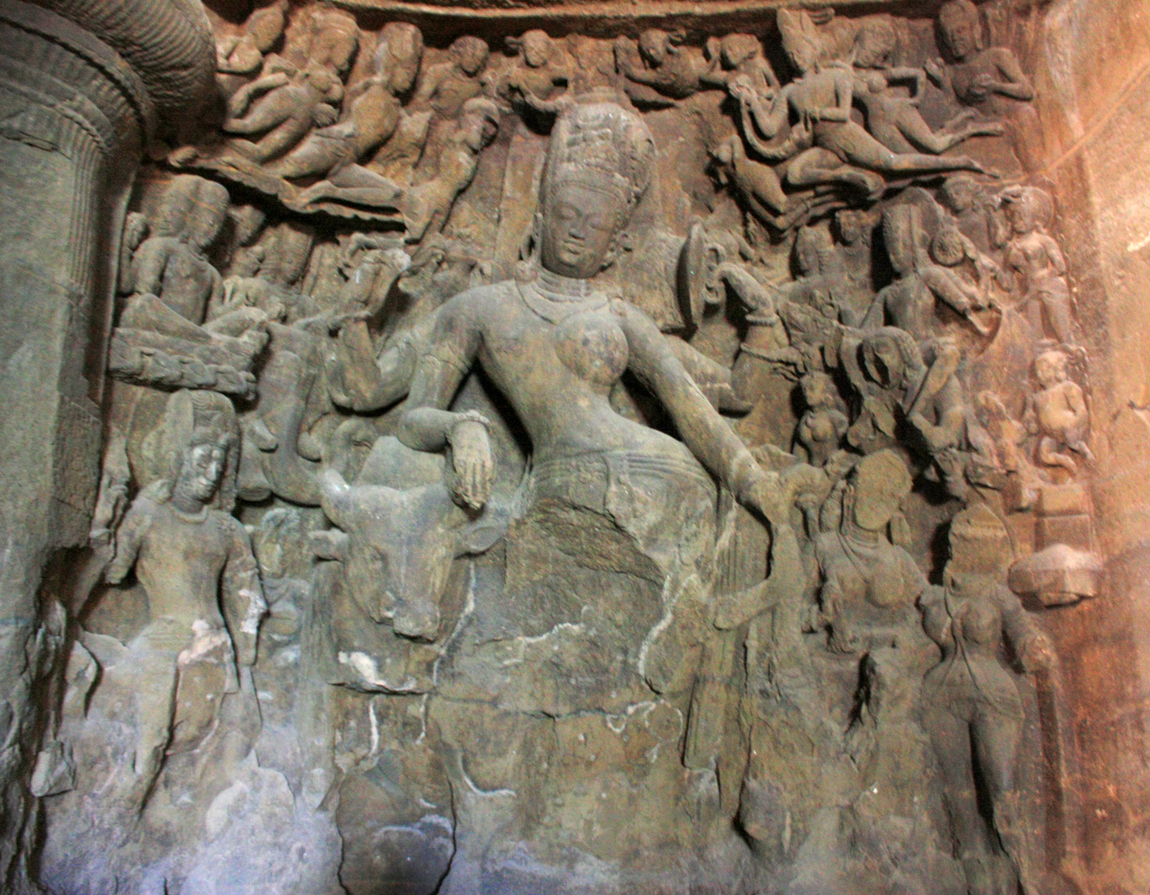 Ardhanari@ Elephanta Caves